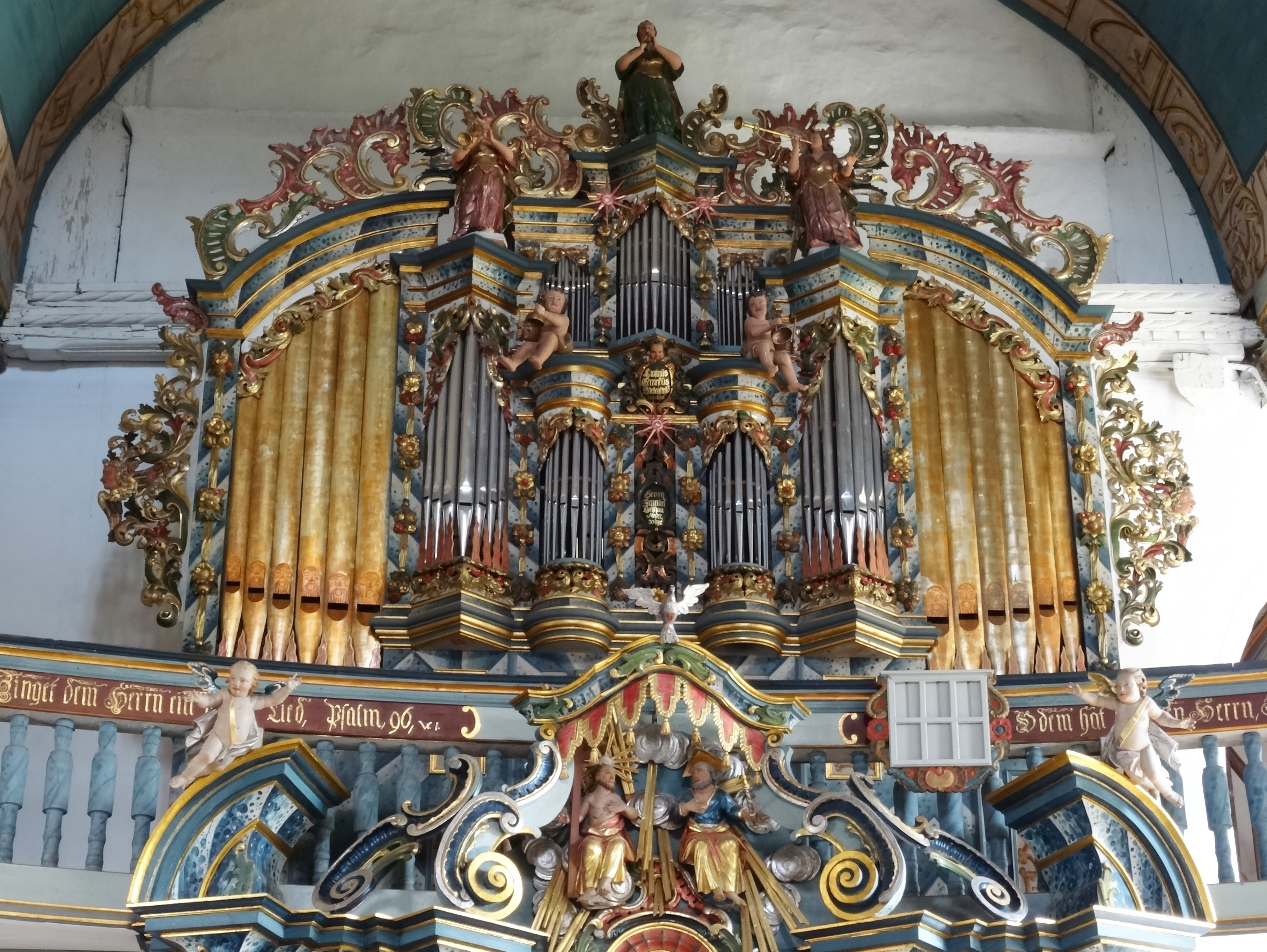 Die Orgel von Bettenhausen wurde 1747 von Johann Ernst Döring ursprünglich für Unterweid gebaut, dann aber aus finanziellen Gründen nach Bettenhausen verkauft.(Orgelakte Bettenhausen). 1766 errichtete Johann Ernst Döring aus Ostheim die Orgel in der Kirche "Zum heiligen Kreuz" in Bettenhausen. 1994 erfolgte durch Hoffmann & Schindler Orgelbau eine Restaurierung. (siehe: Restaurierung der historischen Döring / Markert Orgel